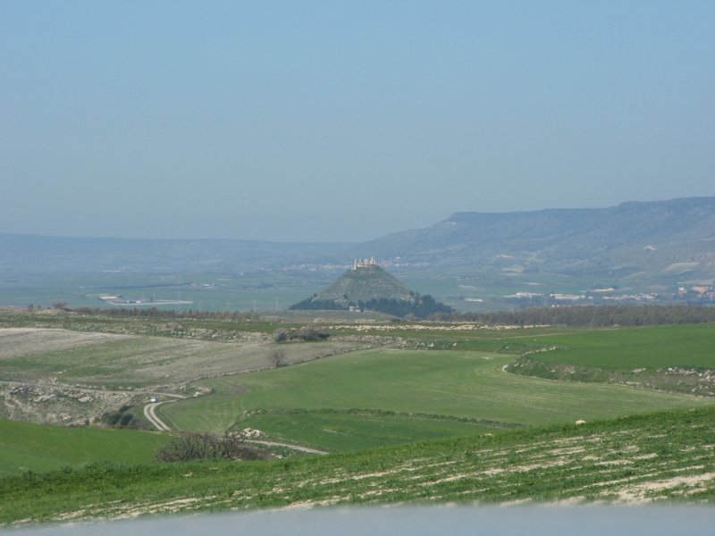 Panoramic from Villanovafranca . Las Plassas castle